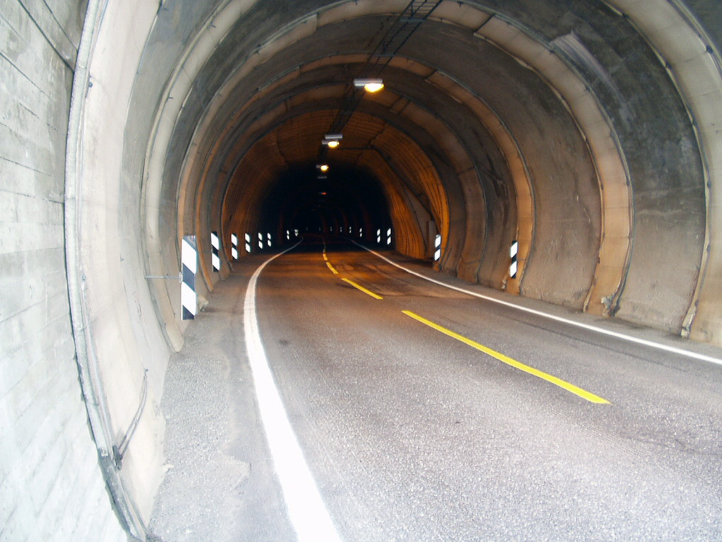 Inngangspartiet på nordsiden av Sortviktunnelen